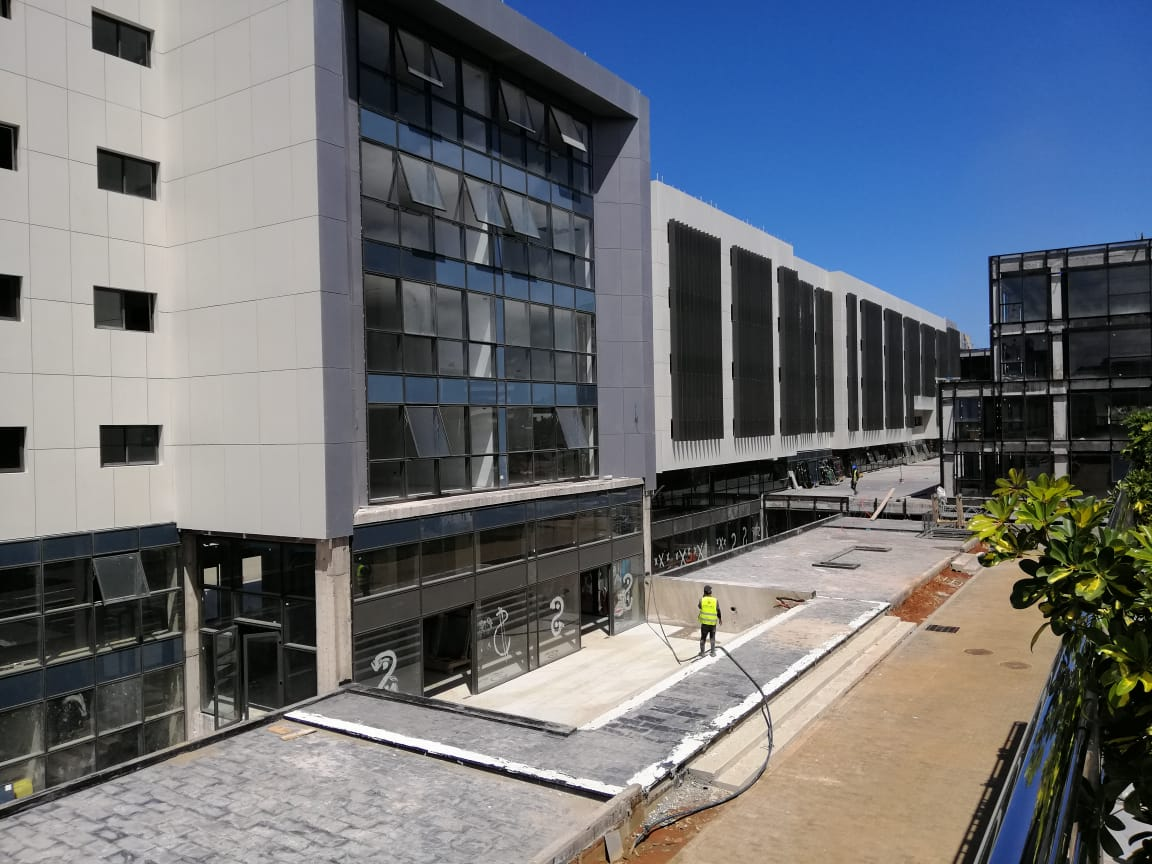 Futur Campus de l'UIASS actuellement en cours de construction